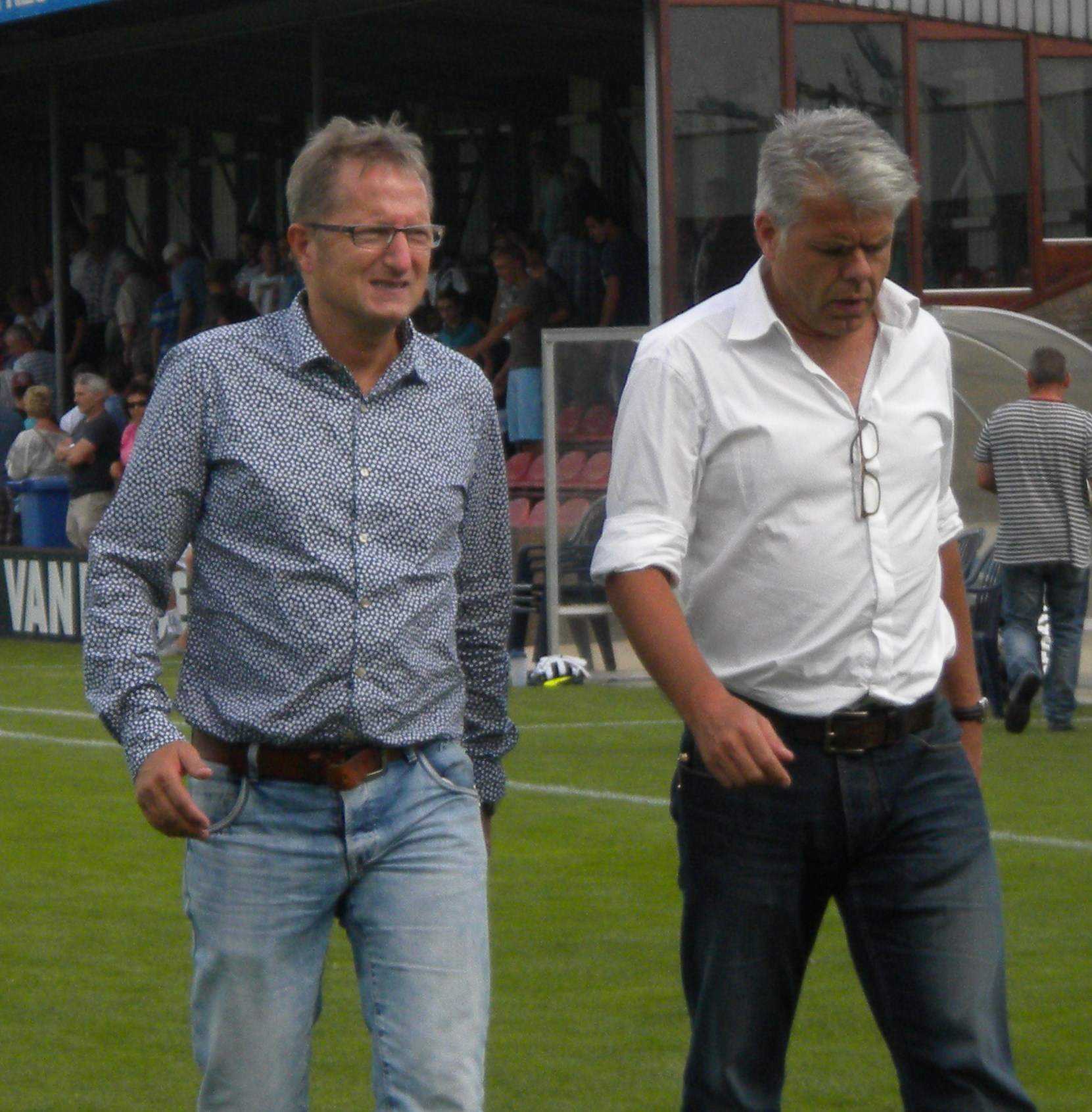 Voetbaltrainer Eric Meijers van JVC en assistent-trainer Frans Derks van diens oude club Achilles '29 in 2014